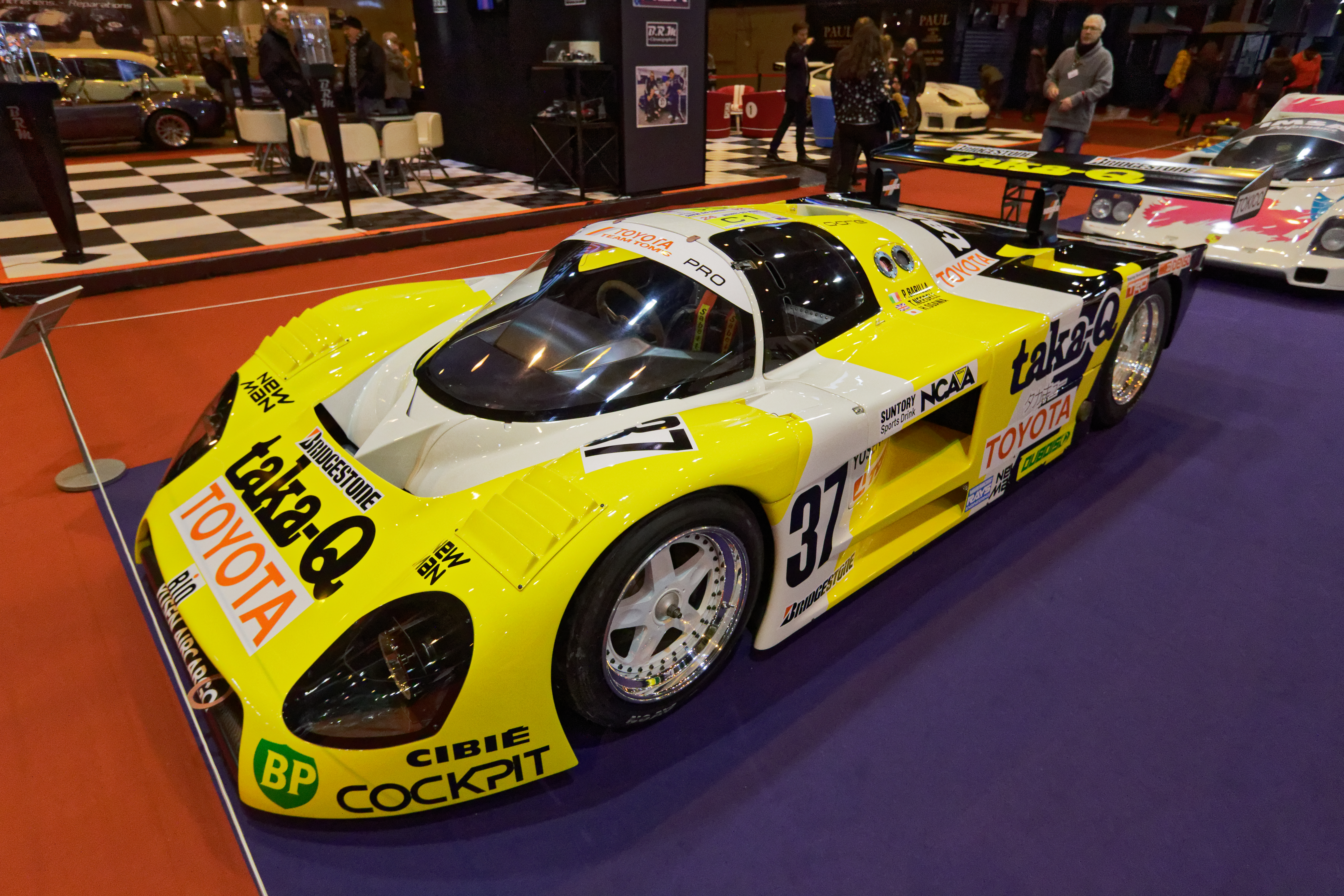 Une Toyota 88C de 1988 exposée lors du salon Rétromobile 2018.